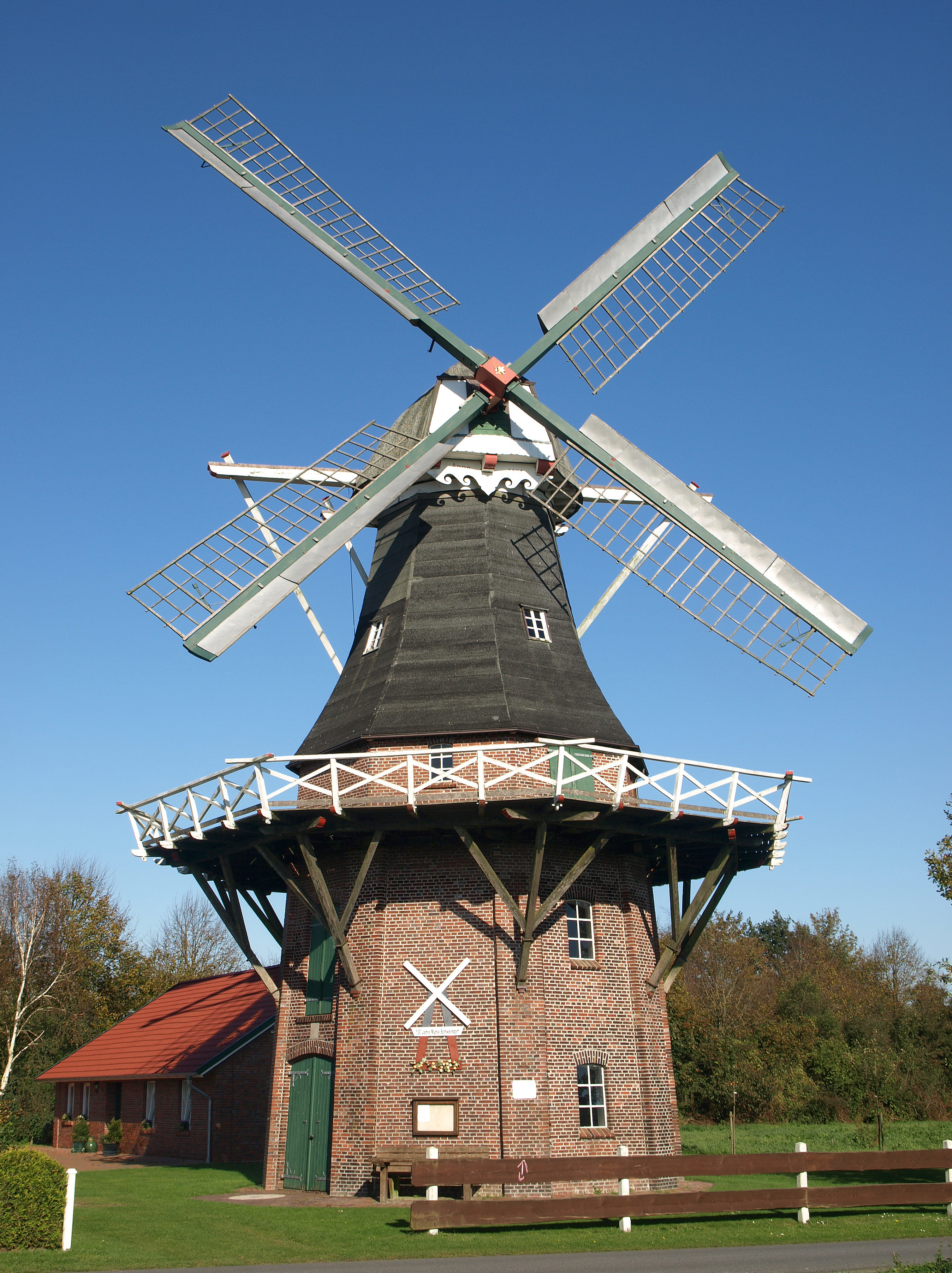 Die Klaashensche Mühle in Schweindorf im Landkreis Wittmund wurde um 1908 erbaut. Sie ist in der Denkmalliste von Schweindorf unter der Nr. 3 gelistet. Hier spiegelt sie sich im Fenster eines gegenüberliegenden Gebäudes.